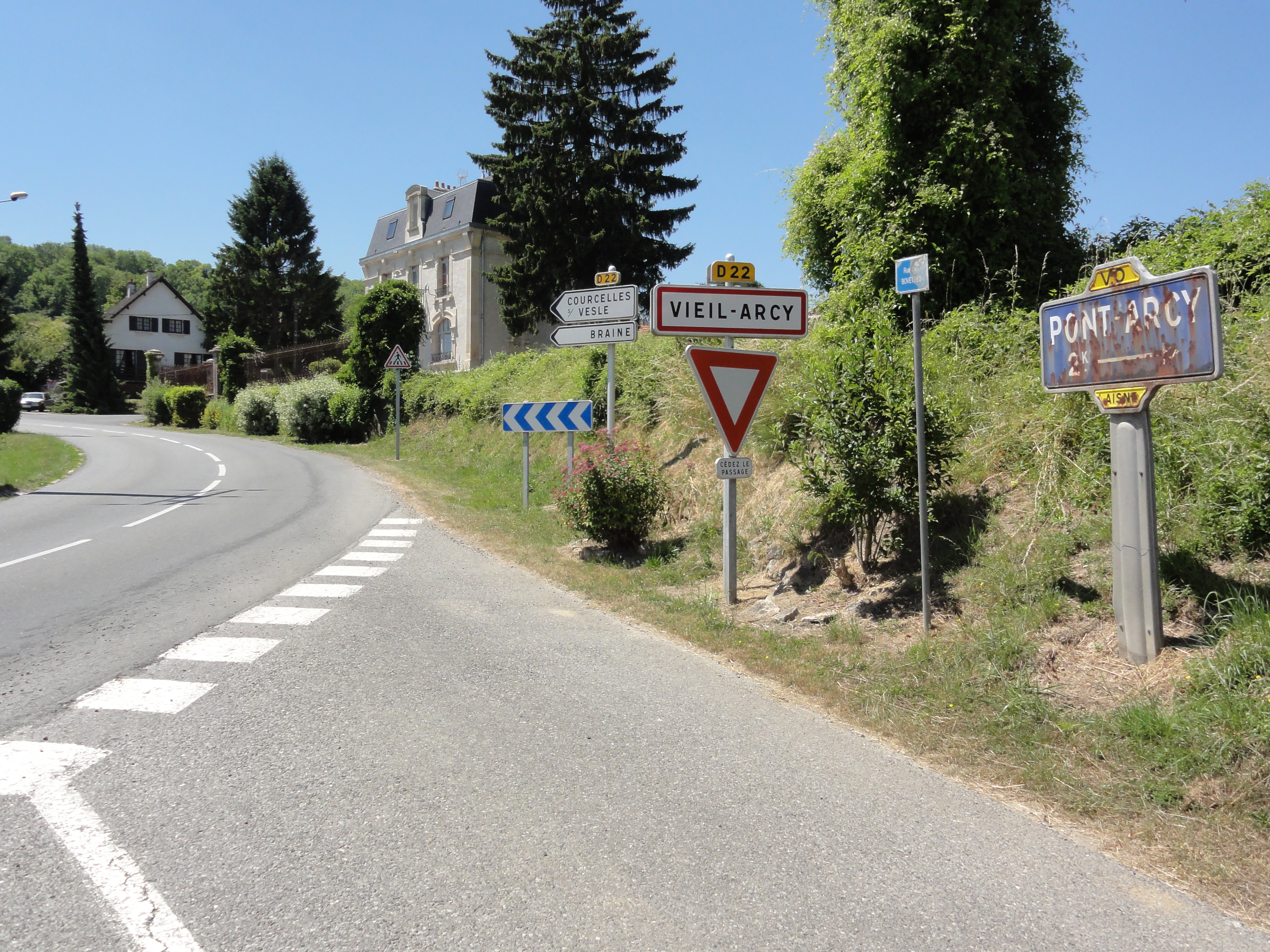 Viel-Arcy (Aisne) city limit sign